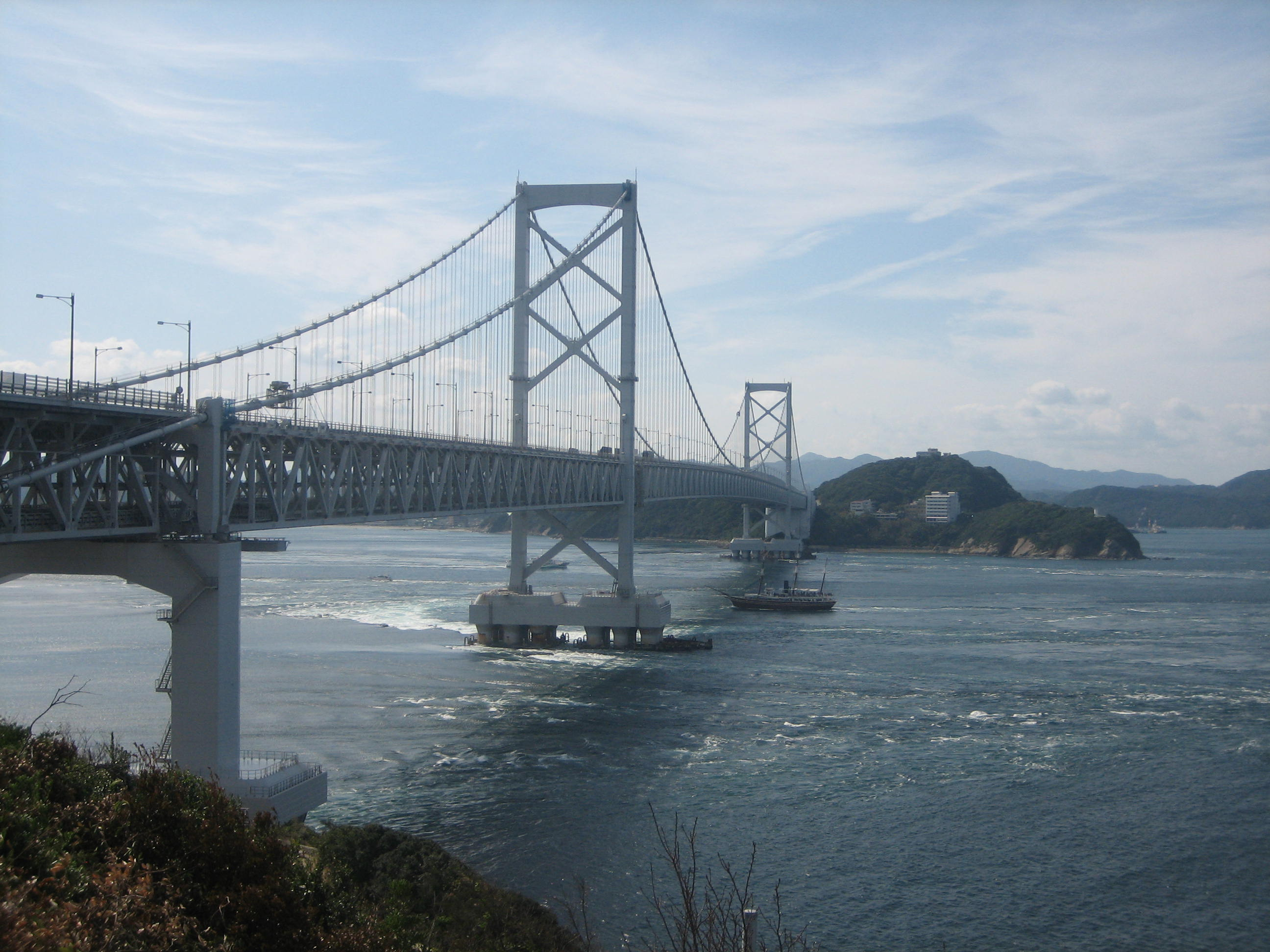 鳴門岬から望む大鳴門橋